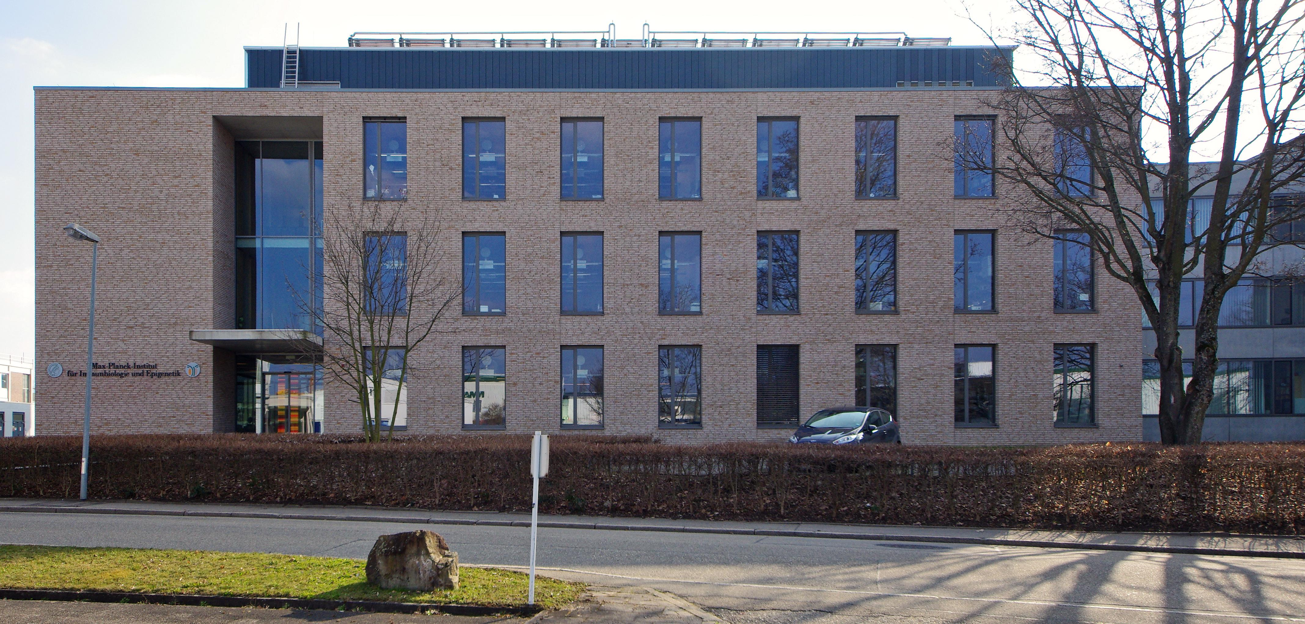 Max-Planck-Institut für Immunbiologie und Epigenetik